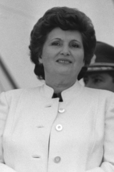 Augusto Pinochet y su esposa Lucía Hiriart